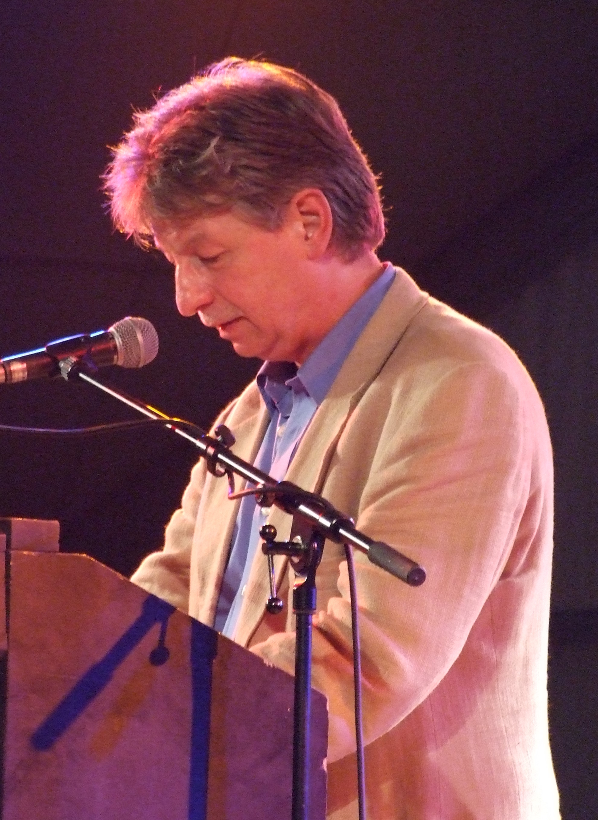 Reinhard Jirgl, während seiner Antrittsrede zur Stadtschreiber-Amtseinführung in Bergen, 2007